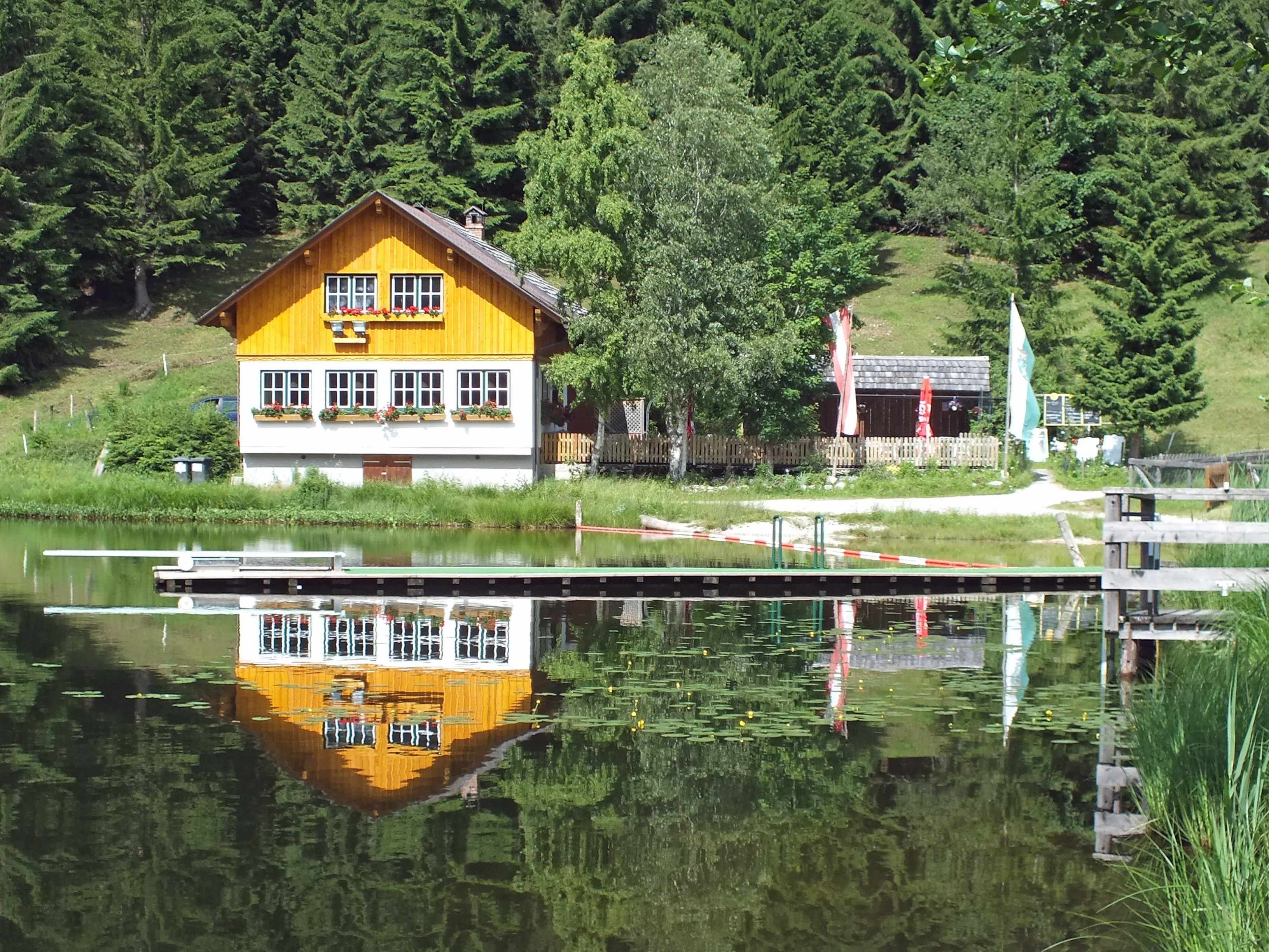 Schutzhütte am Sommersbergsee bei Bad Aussee